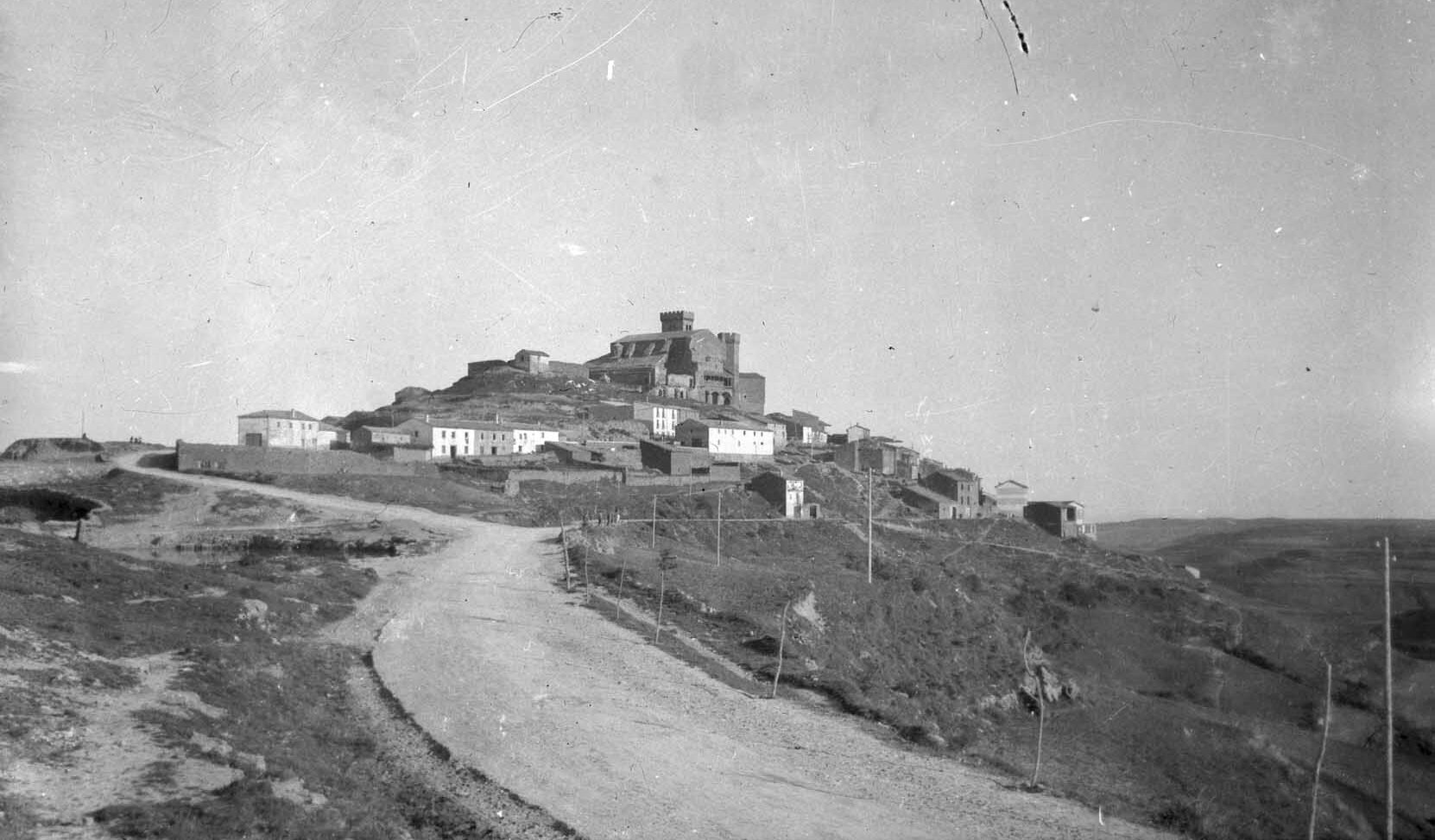 Uxueren ikuspegia 1933. urtean.